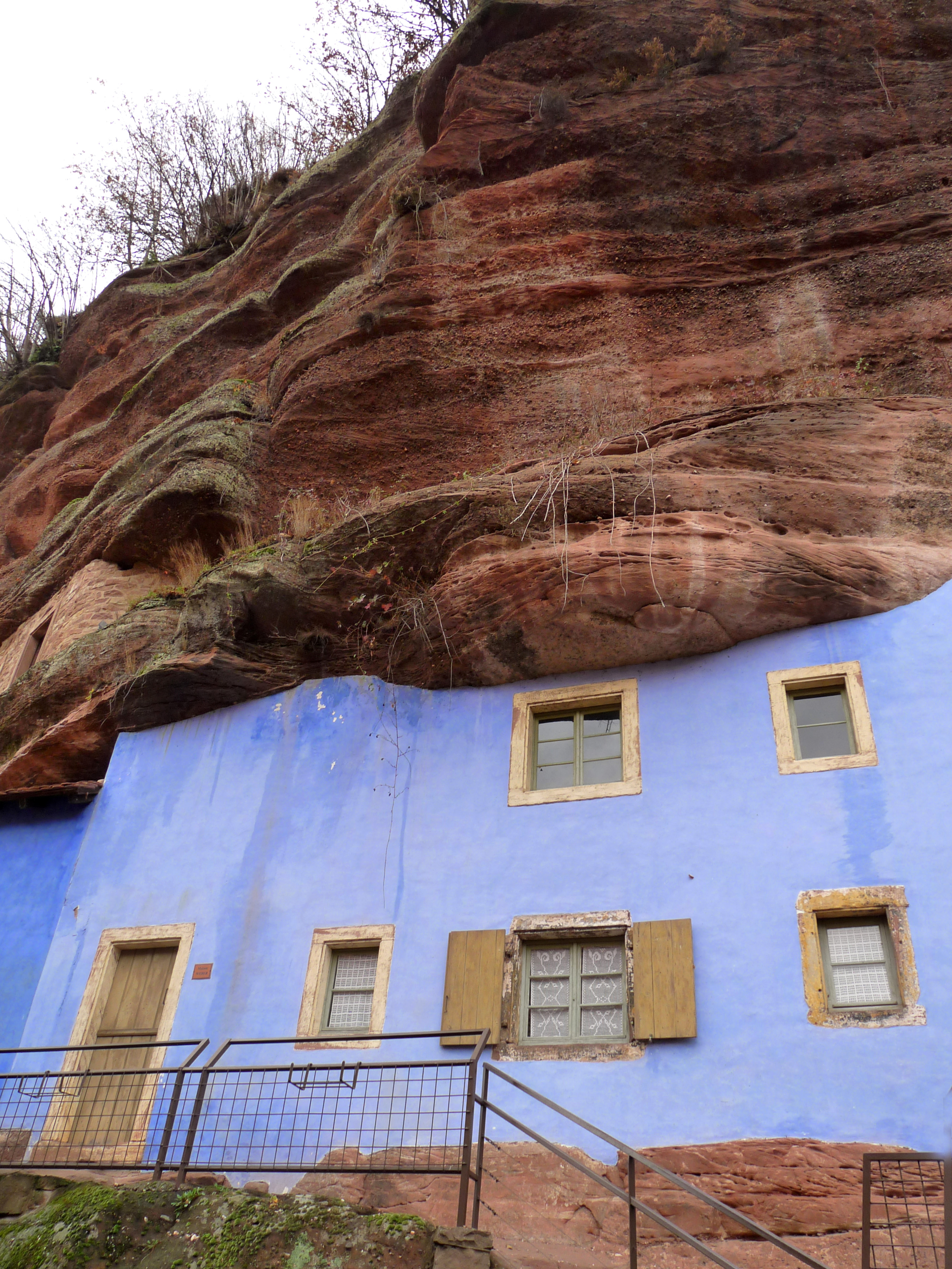 Maisons troglodytes à Graufthal (commune d'Eschbourg, Bas-Rhin)